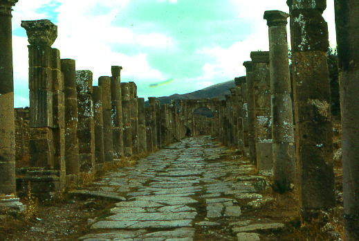 Ruines romaines de Djemila, Algérie